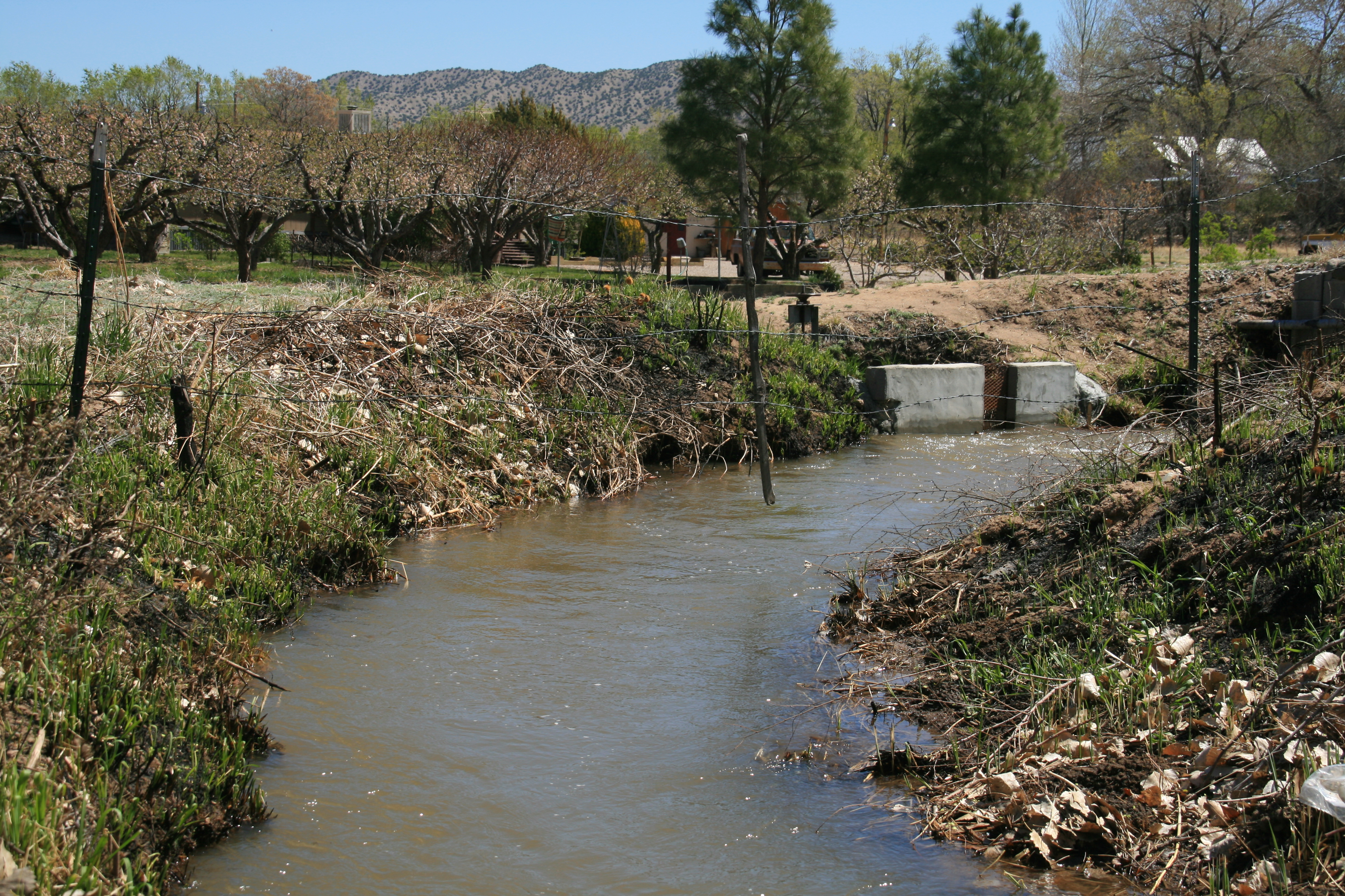 Los Chicos acequia near Velarde, New Mexico